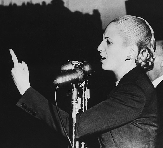 Eva "Evita" Perón en un discurso electoral 1951